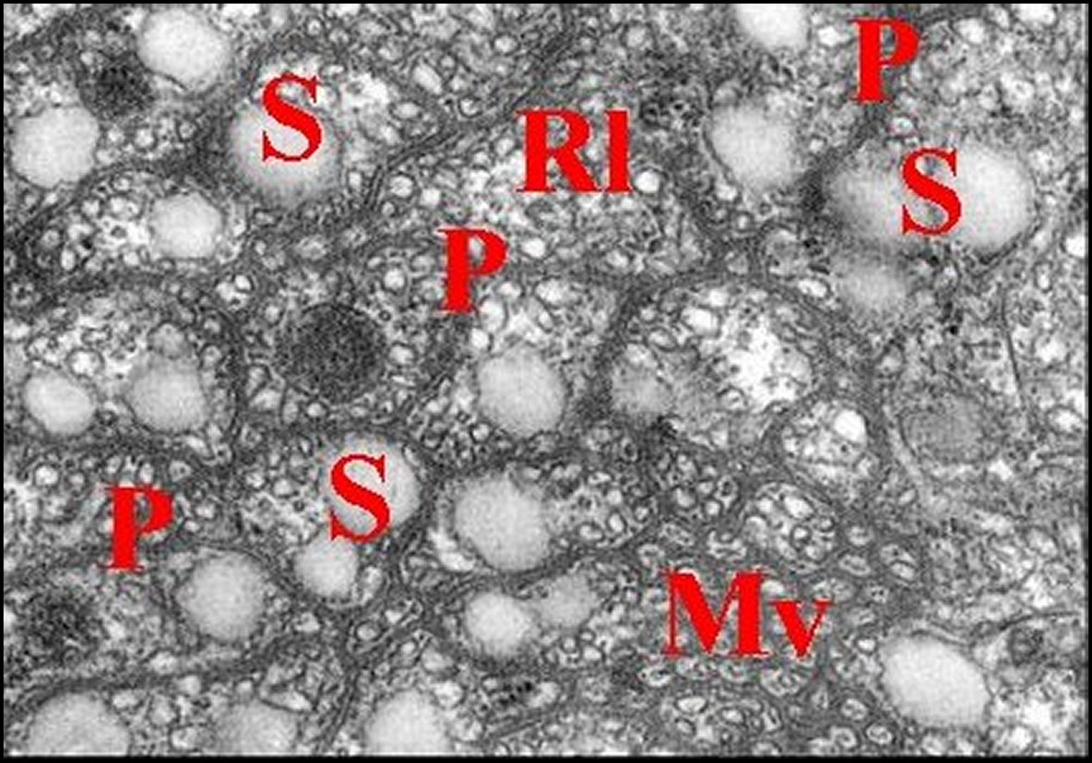 Languettes et microvilli apicales des cellules glandulaires dans la chambre d'une glande rostrale d' Argyrodes en coupe transversale, vues au microscope électronique à transmission.